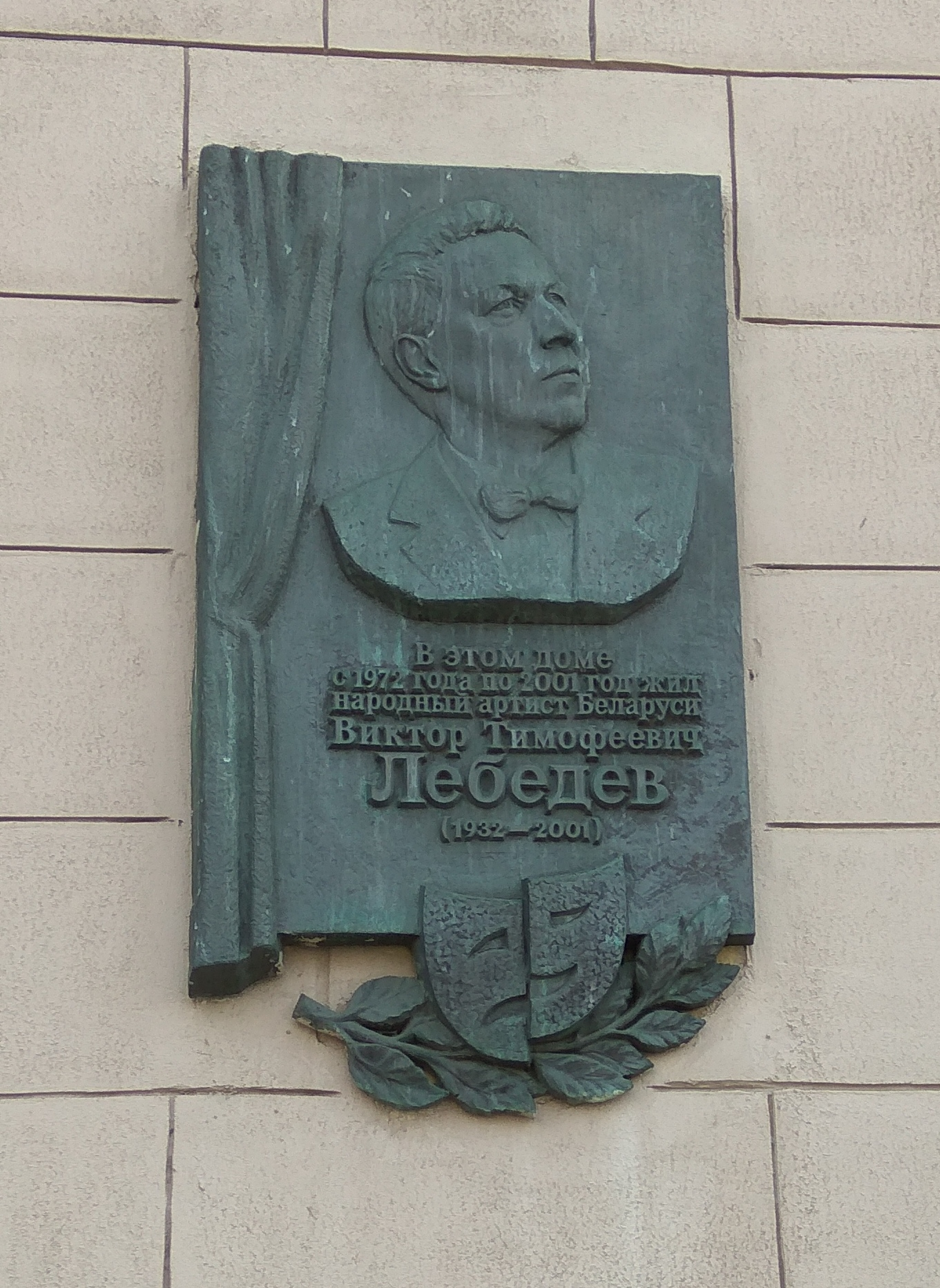 Мінск. пр. Незалежнасці 42. Дошка Віктару Лебедзеву